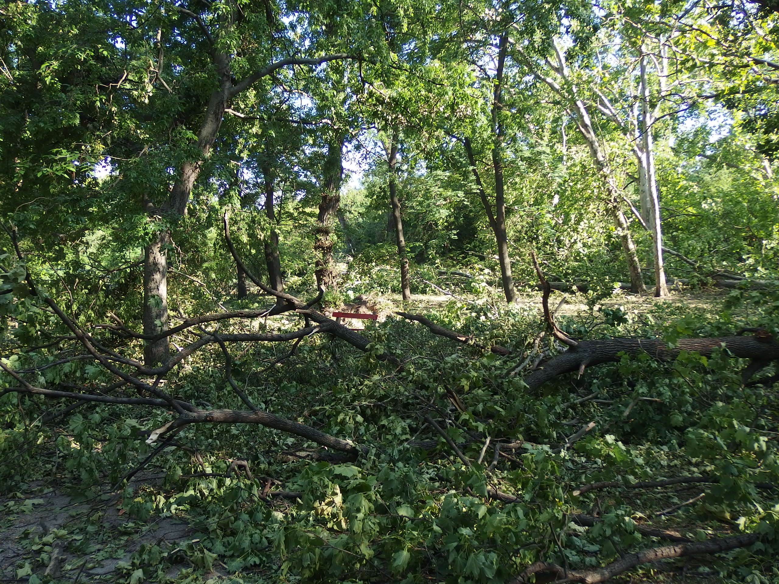 A 2015. július 8-i vihar pusztítása a Népligetben (Budapest)